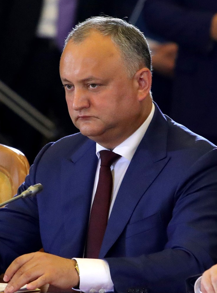 Президент Республики Молдова Игорь Додон на заседании Высшего Евразийского экономического совета в расширенном составе